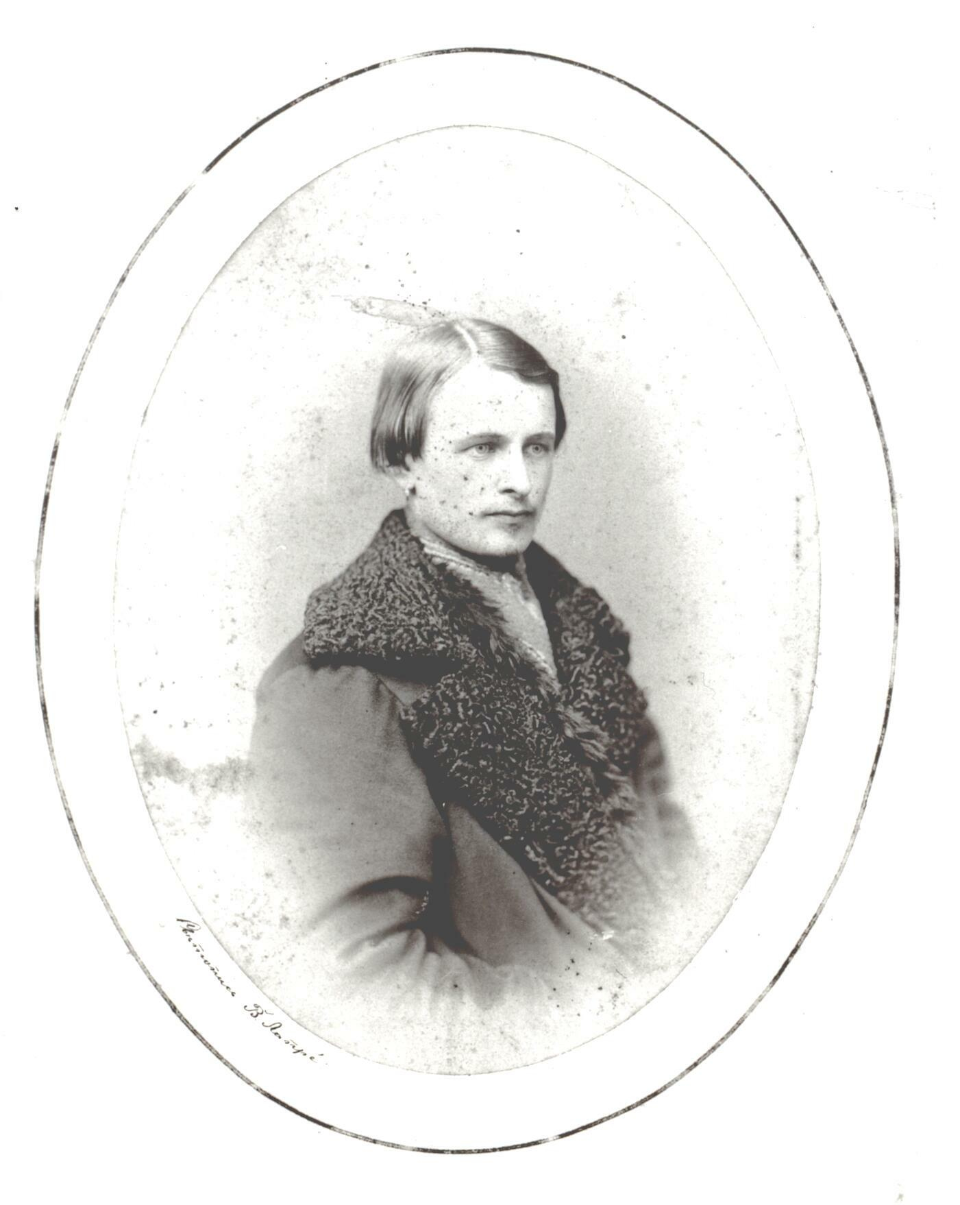 Комиссаров, Осип Иванович.